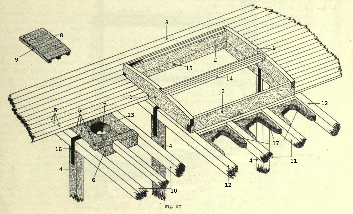 cubierta, fogonadura, bao, mástil, carlinga, escotilla, Galeota de escotilla, Caja (náutica)